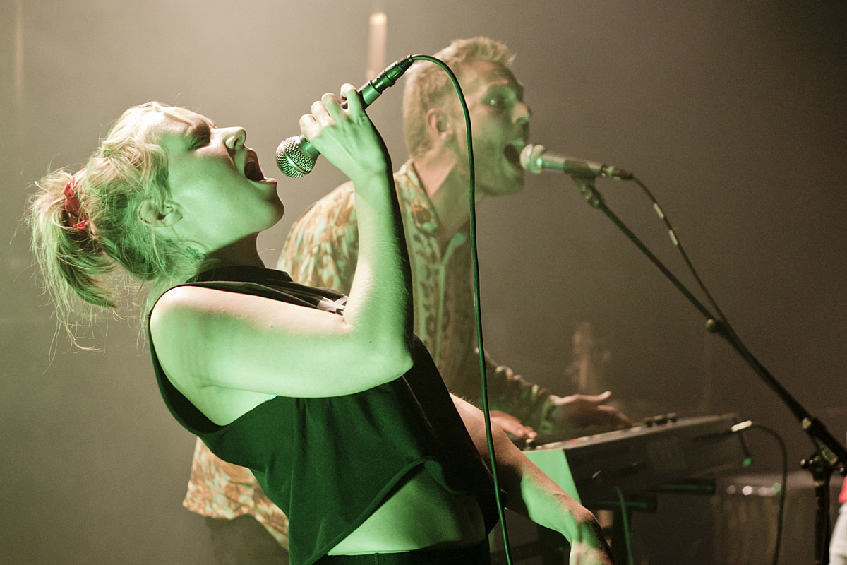 Den danske pop/rock-duo Dig & Mig ved en koncert på Forbrændingen i Albertslund den 21/9-12